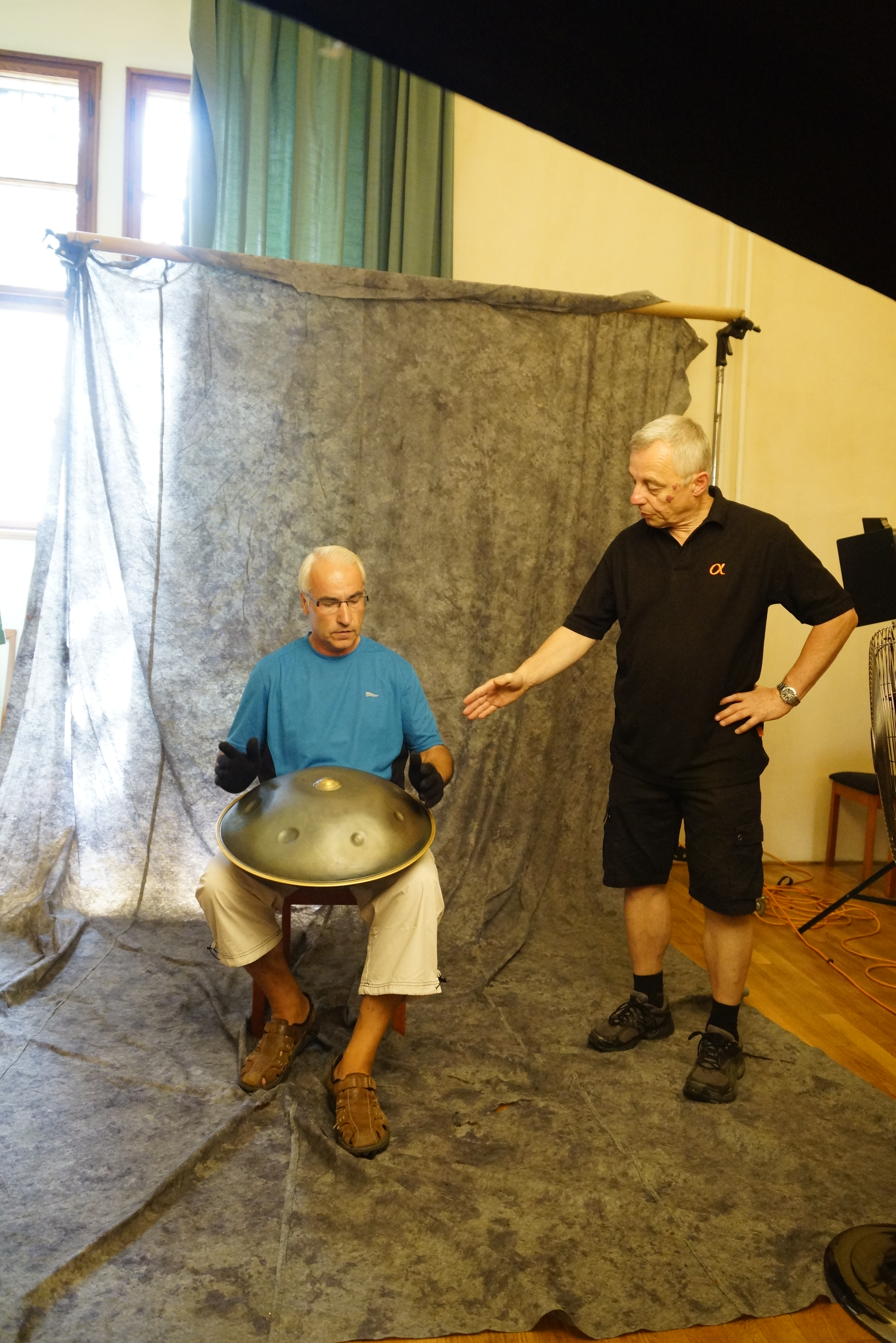 Improvizovaný fotografický ateliér